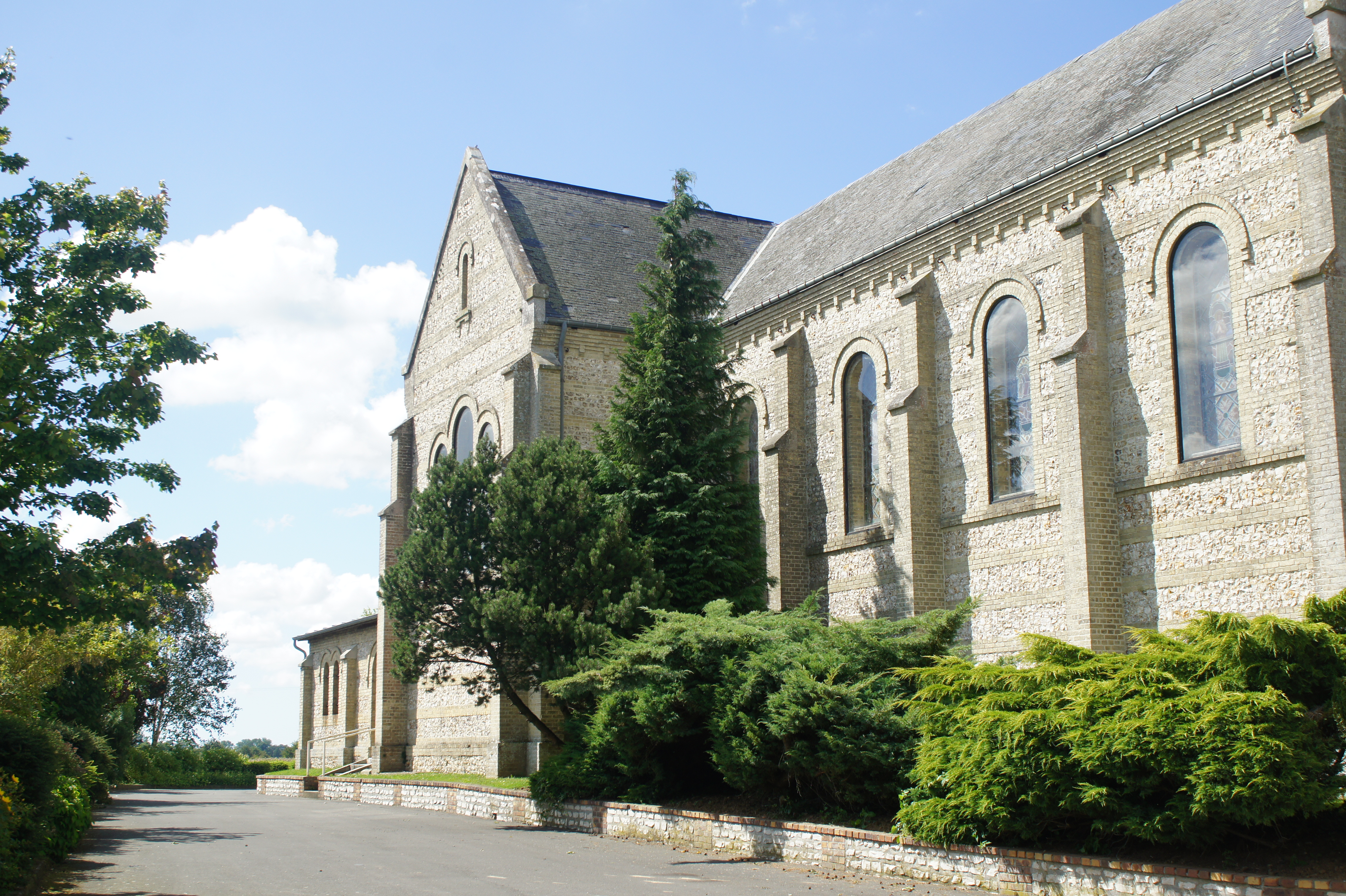 Église de Bernières